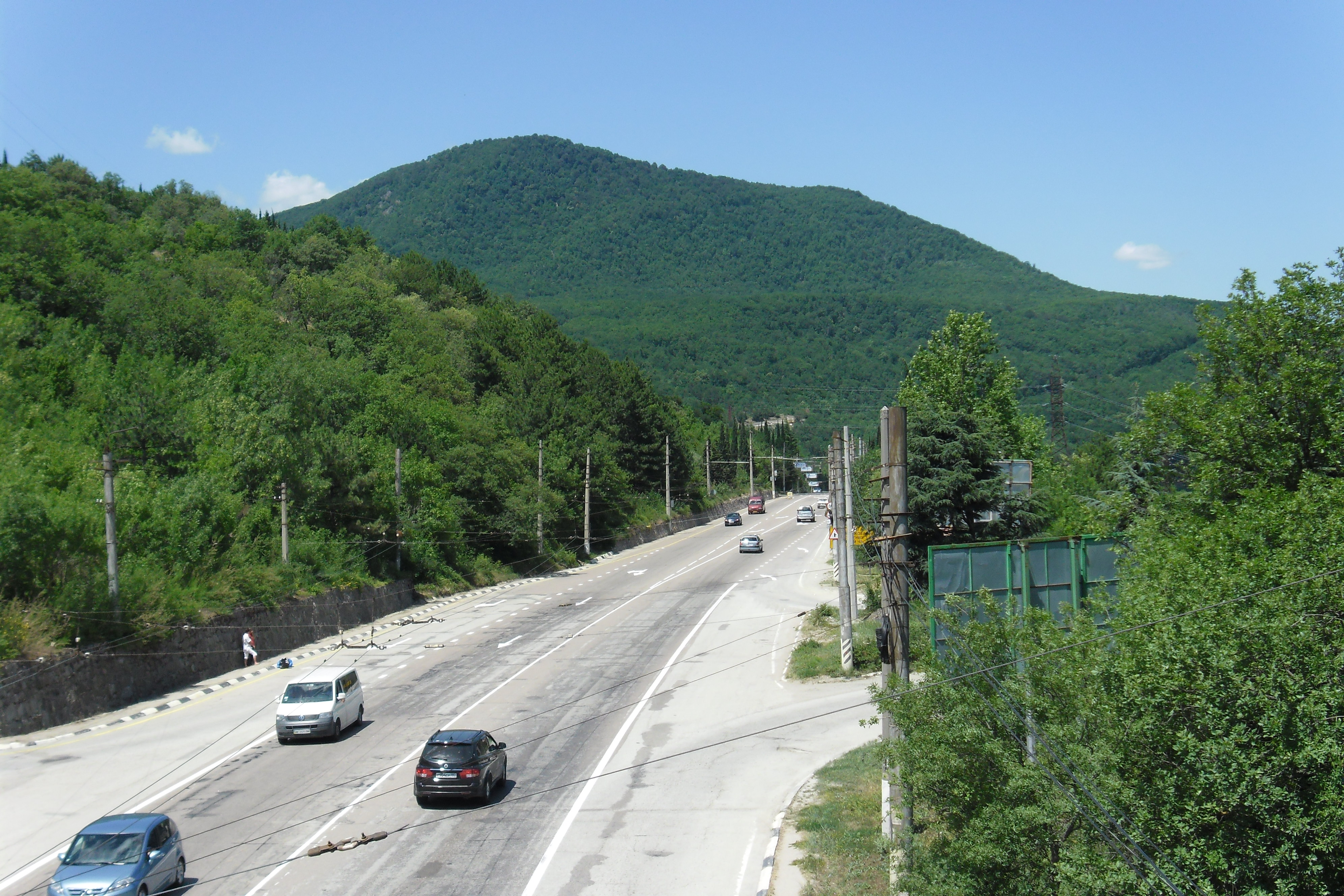 Хребет_Урага: Фото